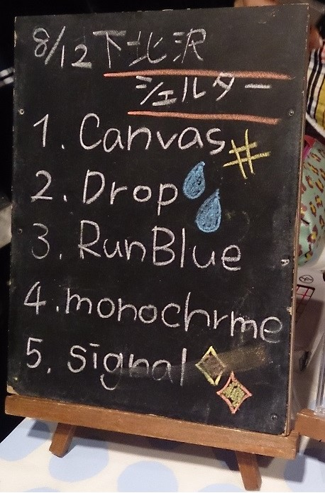 amiinaセトリボード(20150812(1))